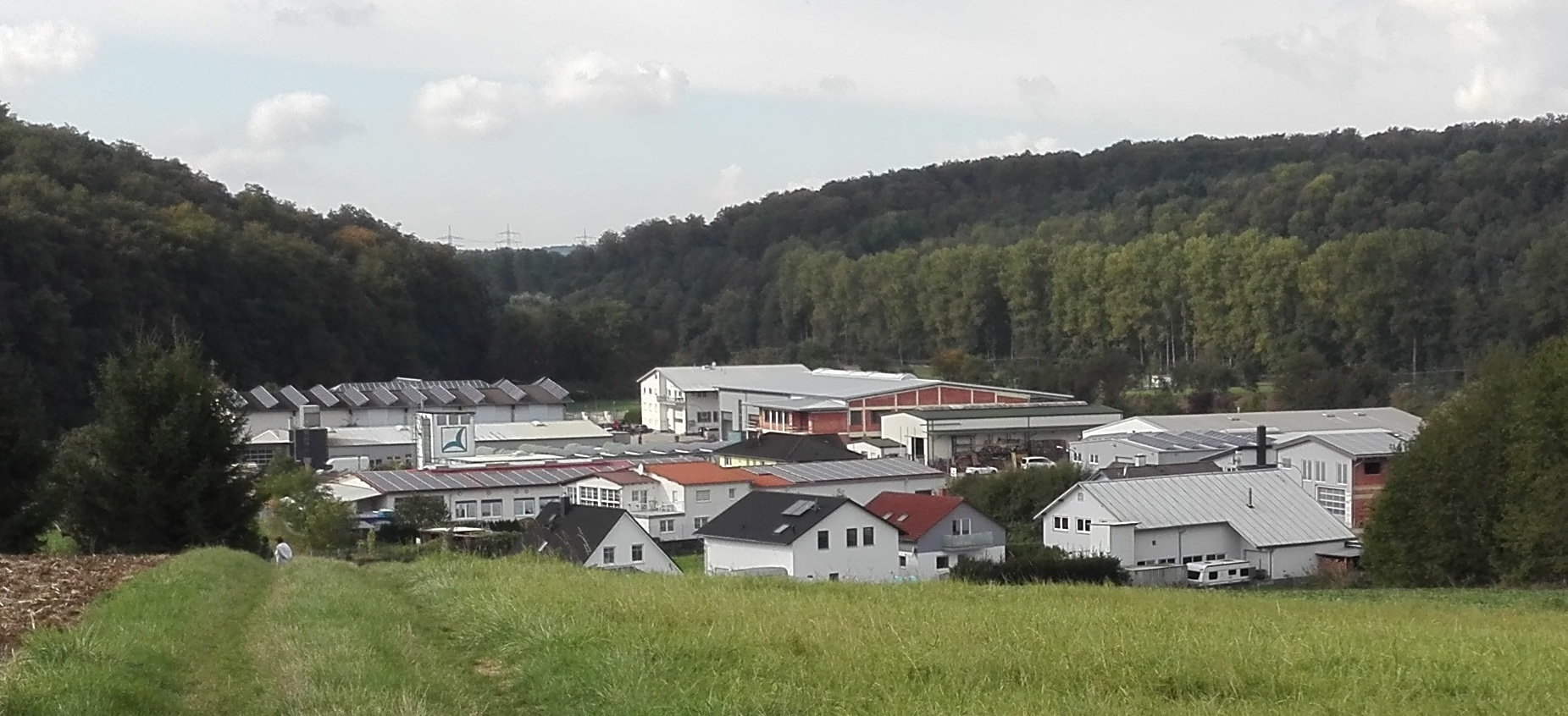 Industriegebiet Eschelbronn